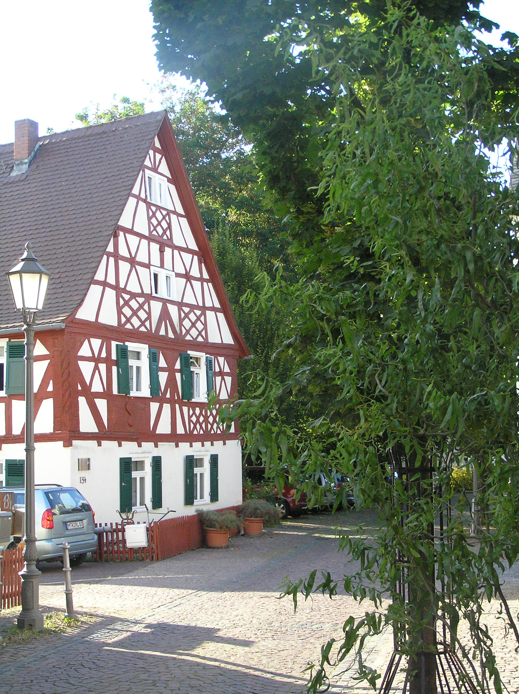 Das Bild zeigt das älteste Fachwerkhaus in Hornau, Kelkheim. Das Gebäude wurde 1568 errichtet und befindet sich in Privatbesitz.